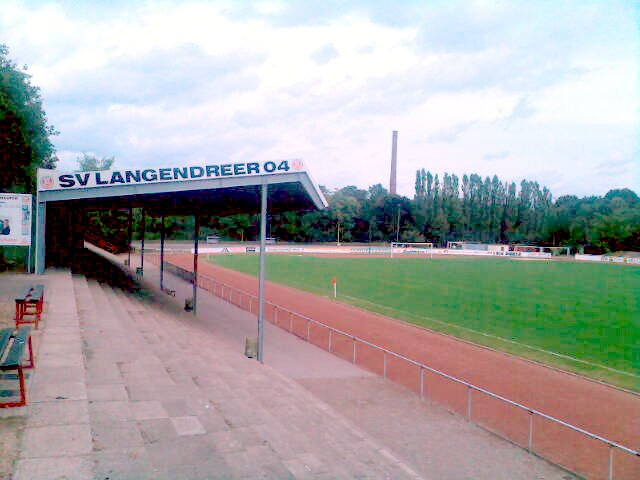 Das Hessenteichstadion in Bochum-Langendreer